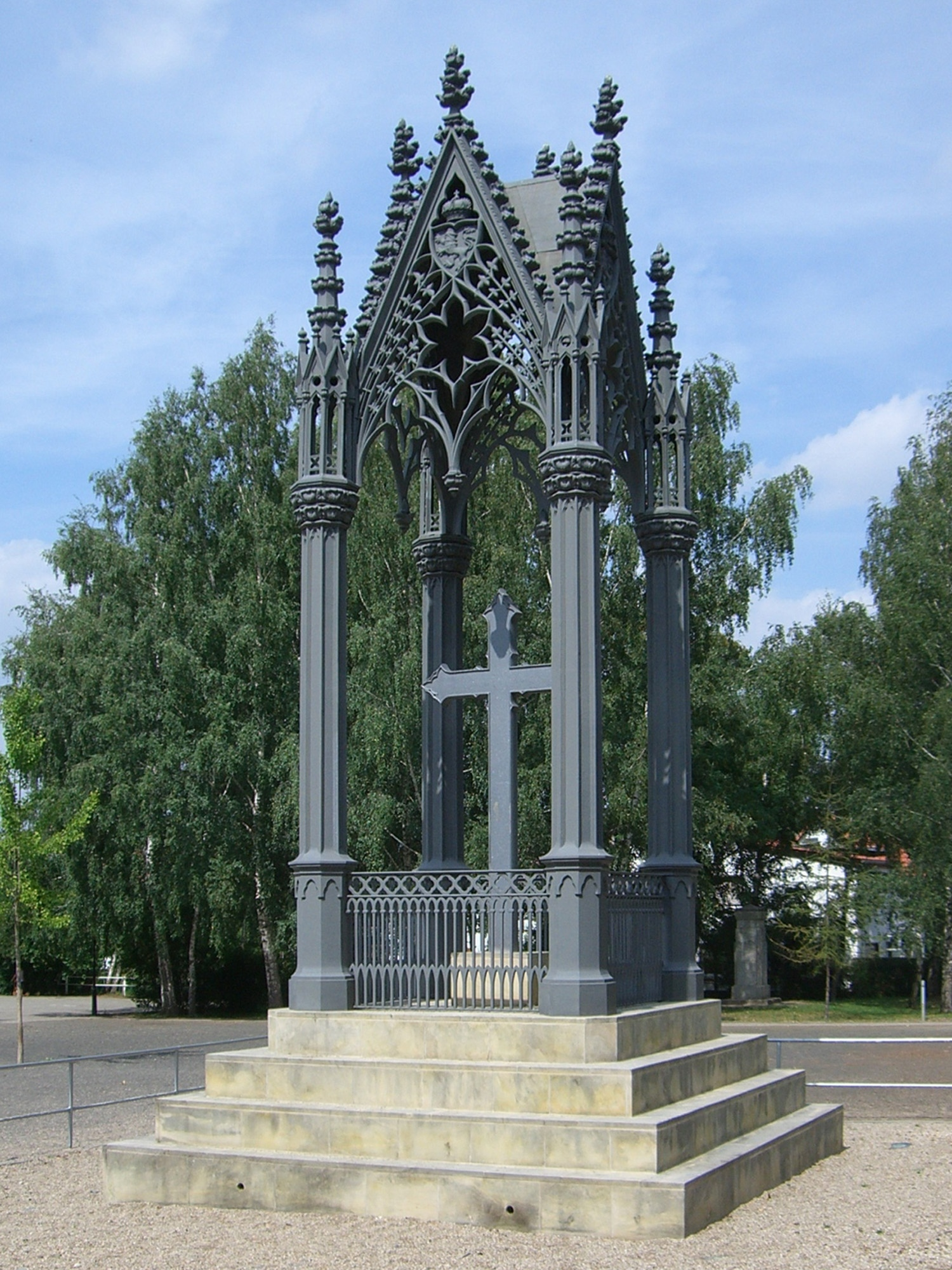 Denkmal für Prinz Leopold von Hessen-Homburg in Großgörschen. Das bereits zwei Jahre nach dem Tode des in der Schlacht Gefallenen von seiner Schwester Marianne errichtete Denkmal wurde von Schinkel entworfen. Es musste 1974 wegen Baufälligkeit infolge Durchrostung von innen abgetragen werden. Die neue Kopie wurde am 2. Mai 1999 eingeweiht.